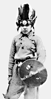 Ernesto Guevara. Alta Gracia. Córdoba. Argentina. 1937 (frag)